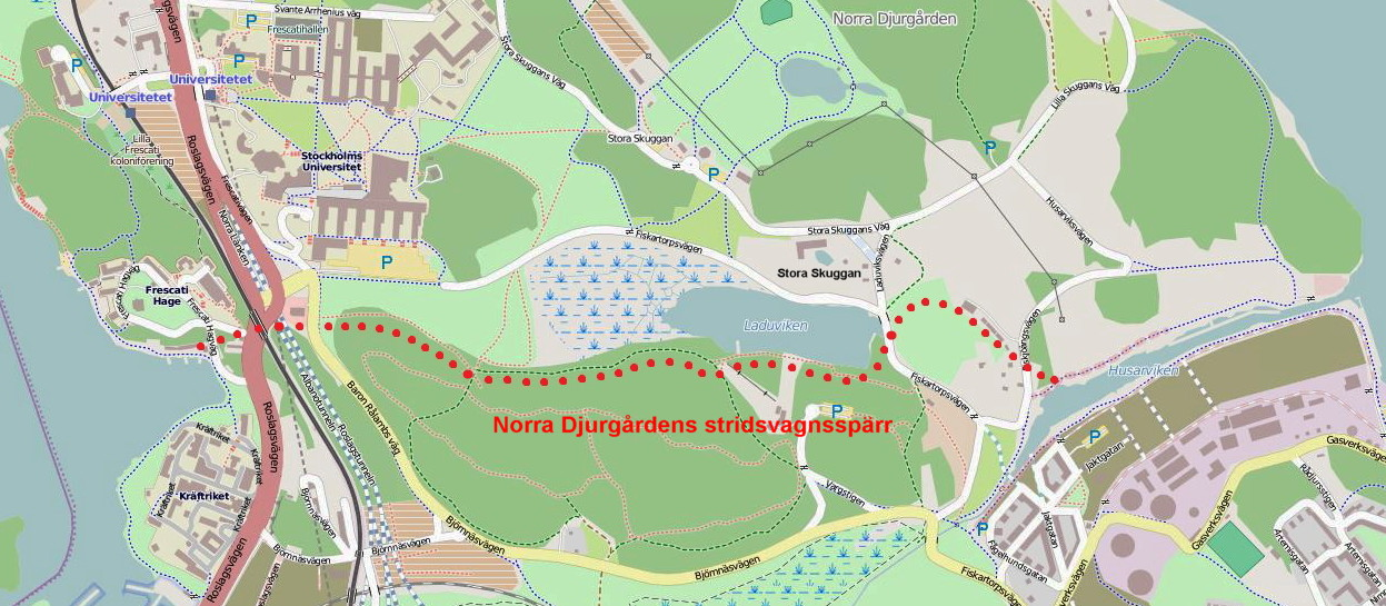 Sträckning för Norra Djurgårdens stridsvagnsspärr på Open street map